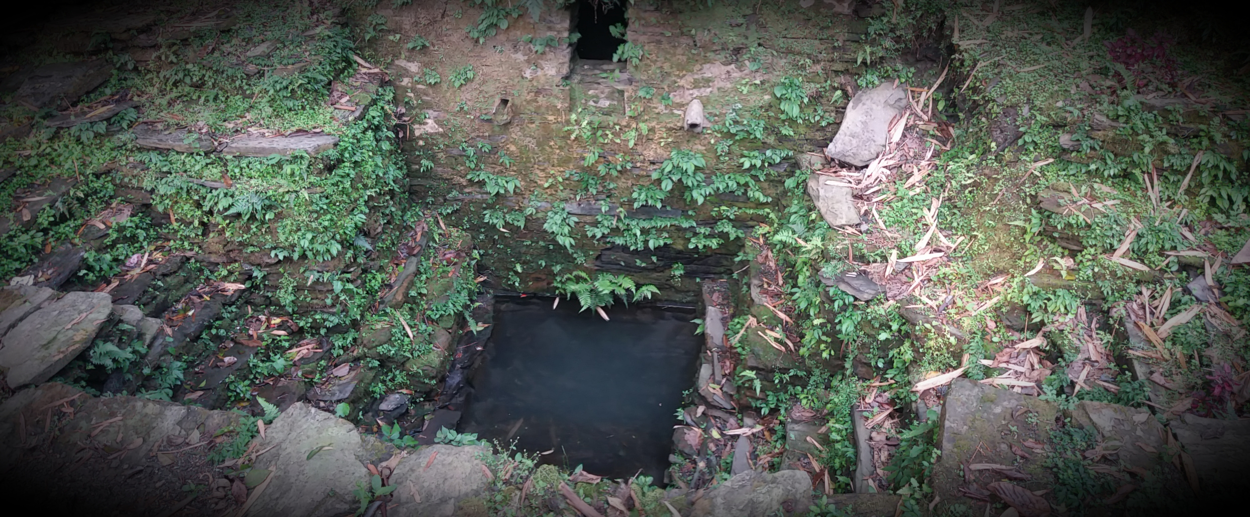 नेपाली: नेपालको कुनै एक गाउँमा रहेको पधँराको तस्बिर